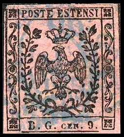 Газетная налоговая марка Модены из первого выпуска